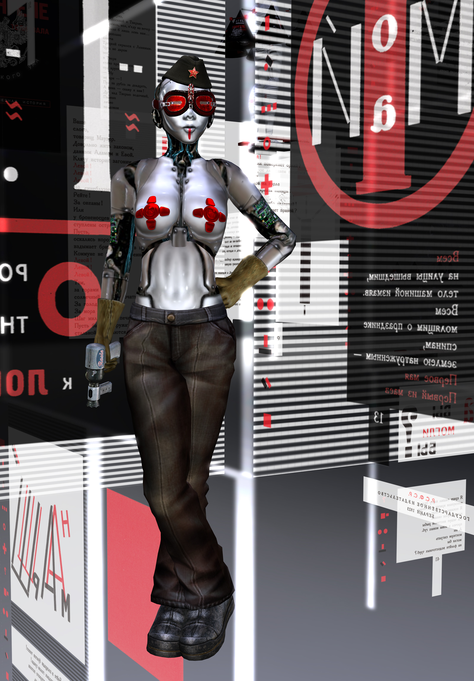 blogpost ~